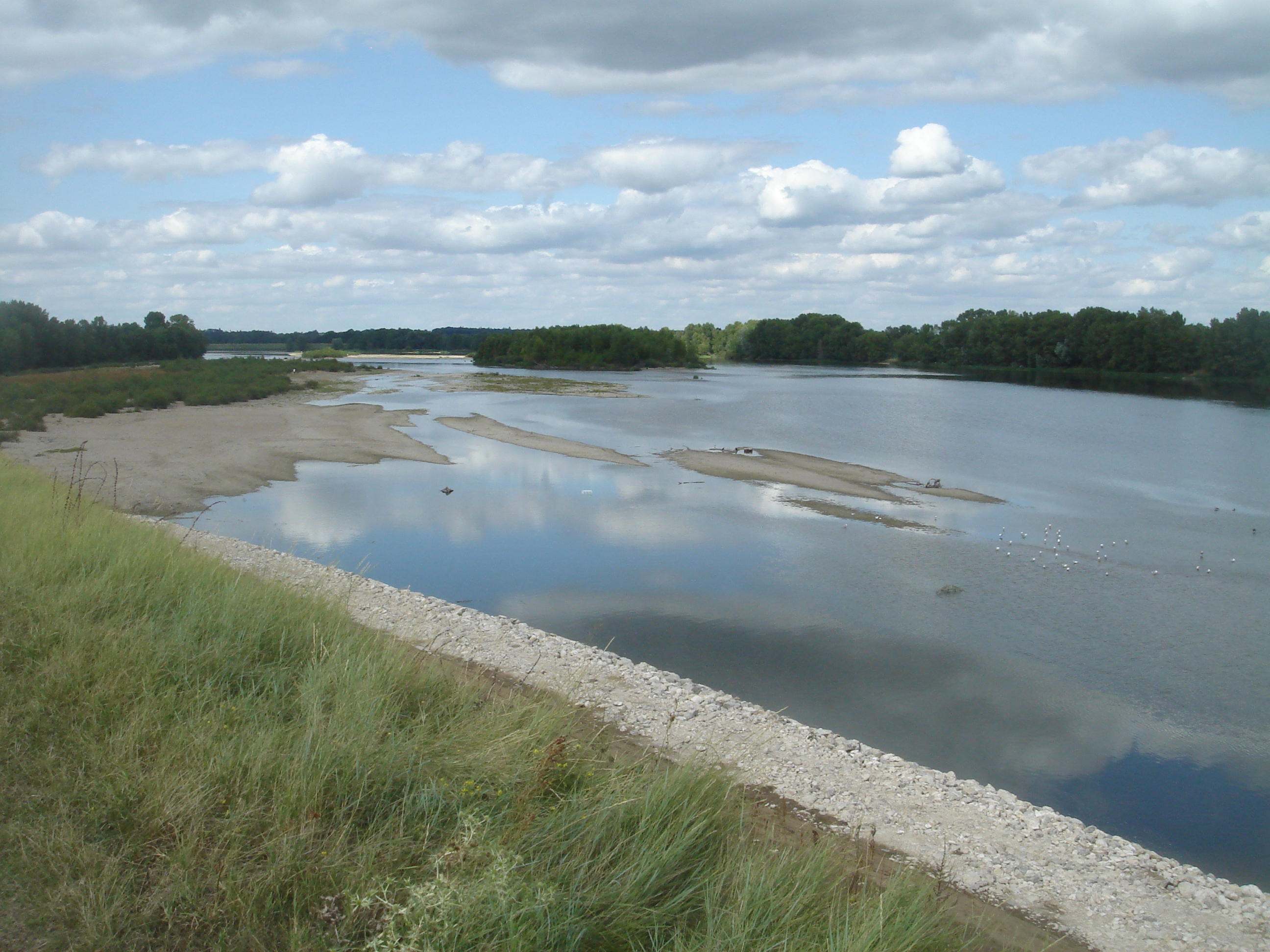 Bord de Loire à Sandillon, Loiret, Centre, France